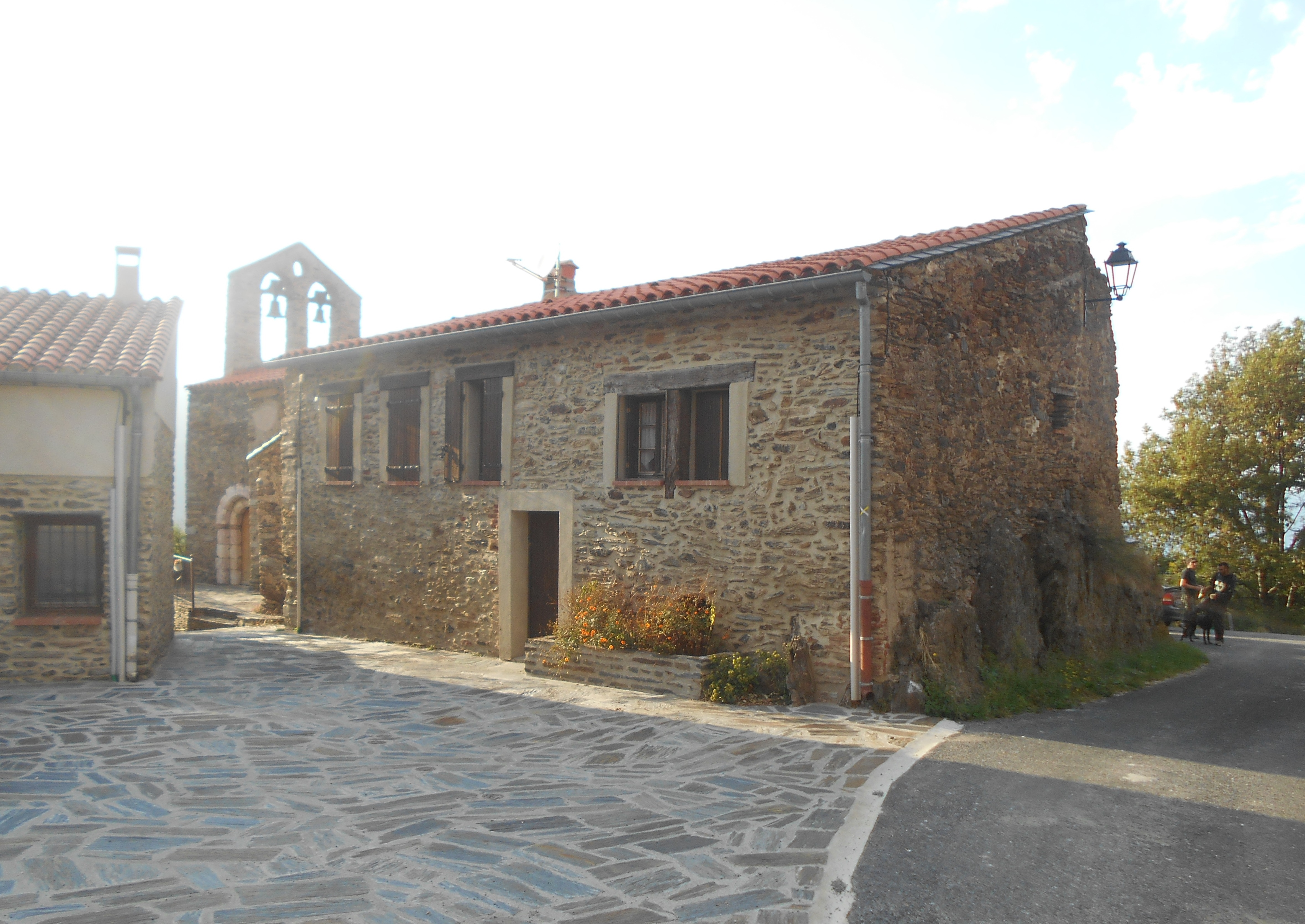 El petiti nucli de Glorianes, al Conflent